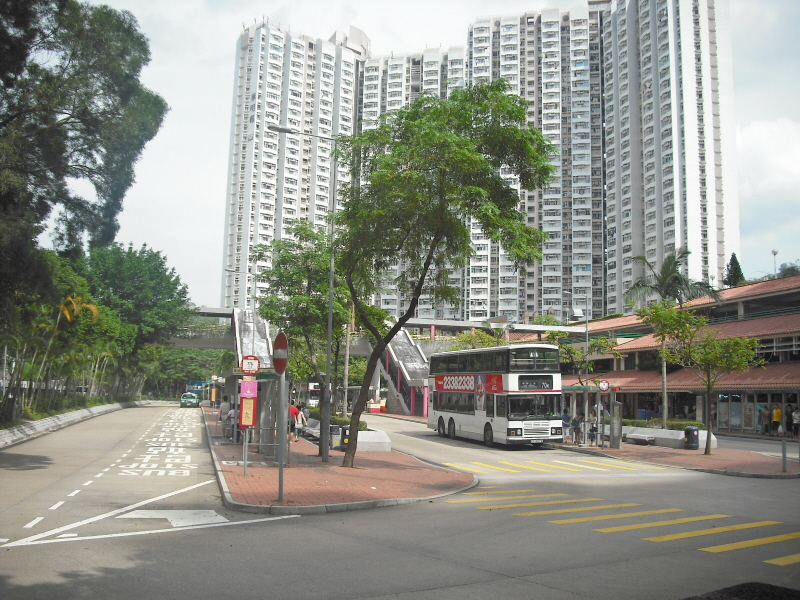 華明巴士總站